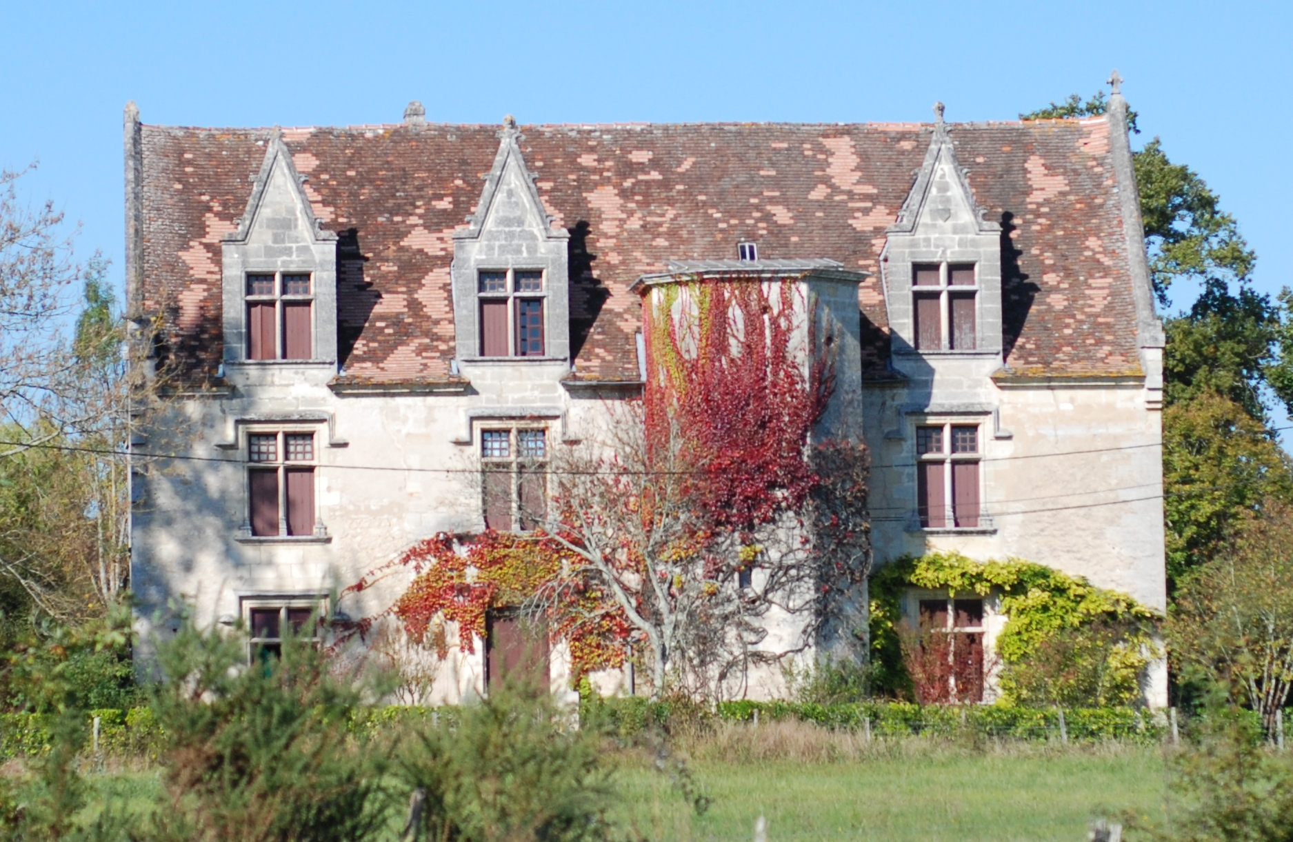 Château Buffaud, situé sur la commune d'Aubie-et-Espessas, Gironde, France.